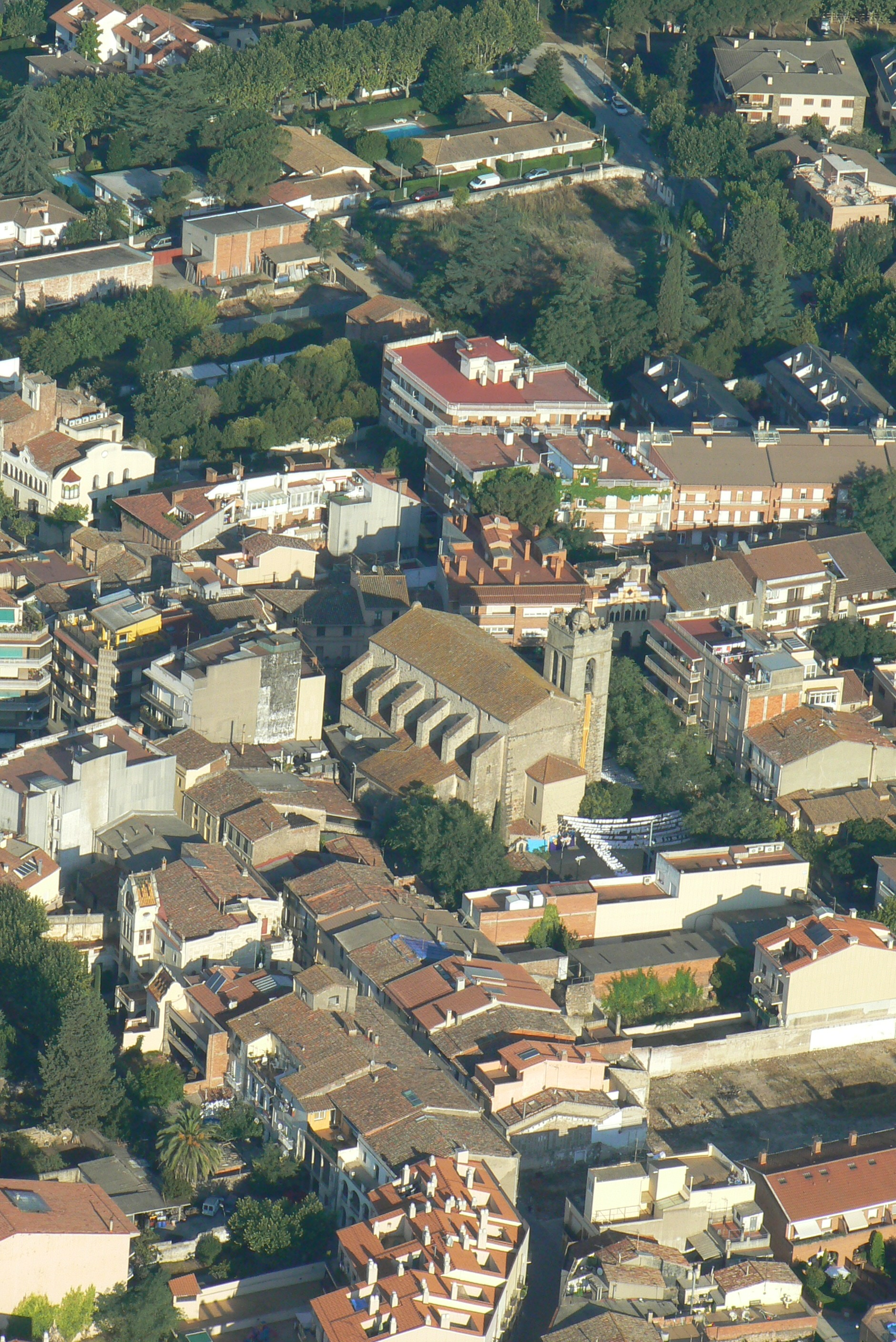 Vista del centre de Cardedeu des de l'aire.